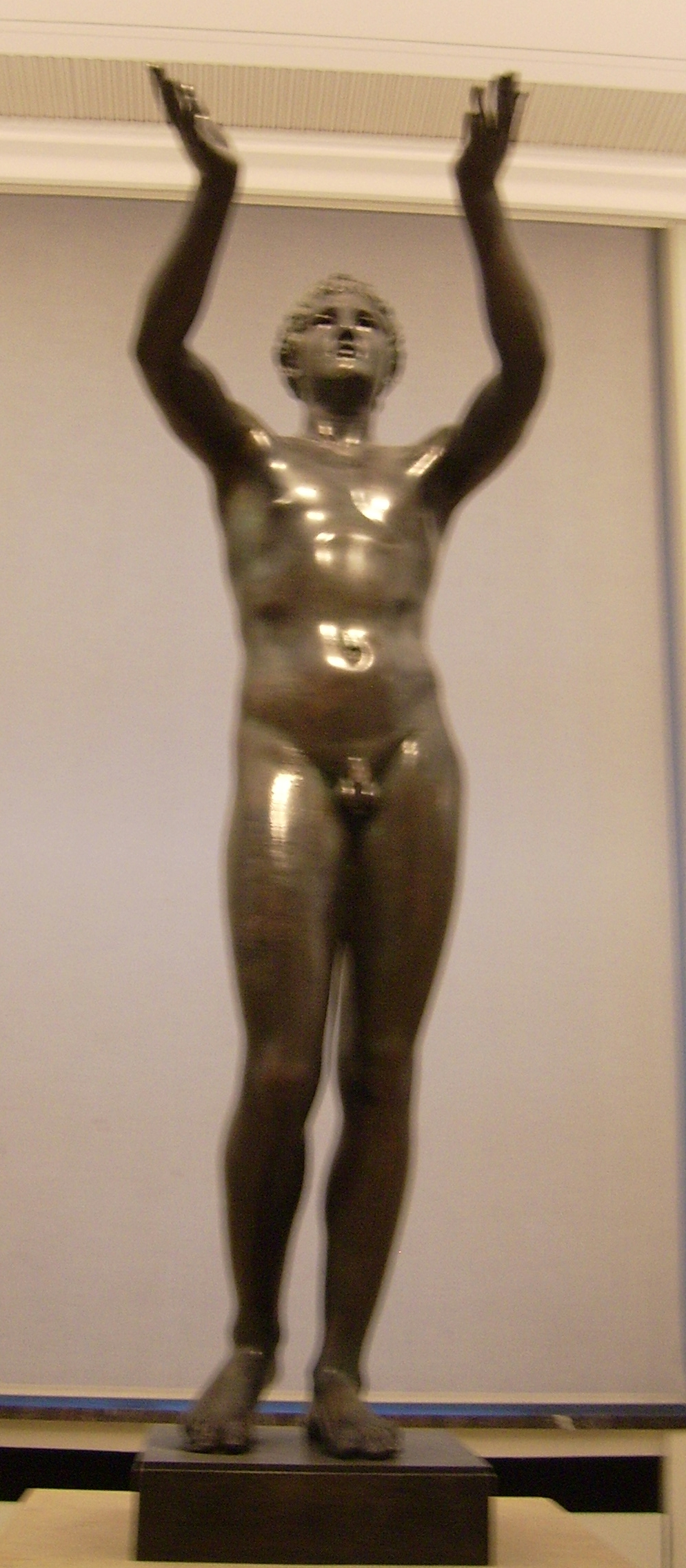 Antikensammlung Berlin/Altes Museum